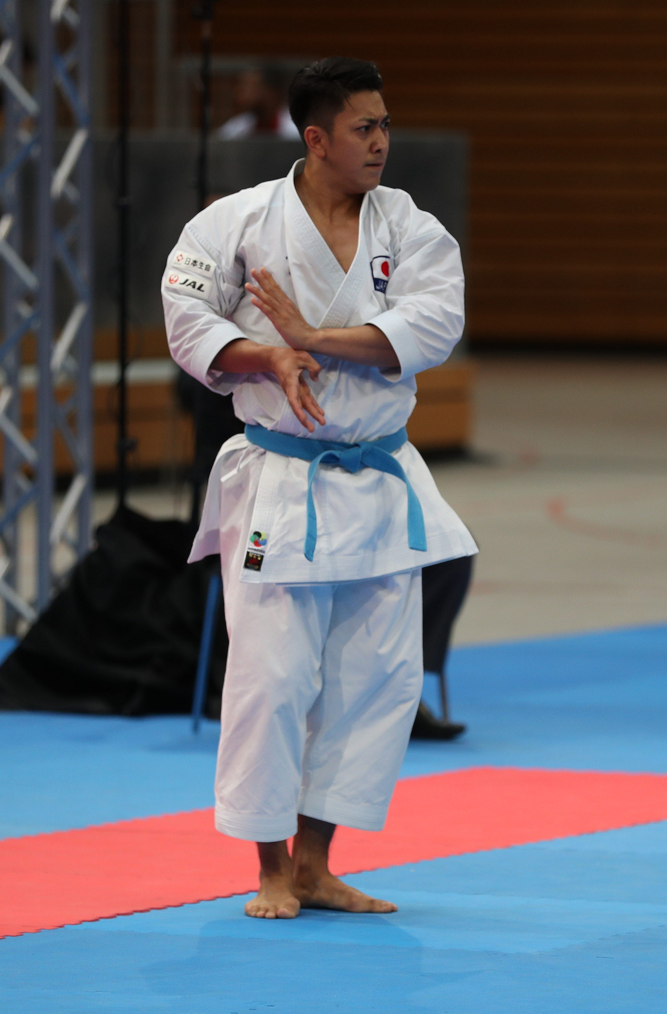 Male Kata am 16. September 2018 in der Karate1 Premier League Berlin 2018. Abgebildet: Ryo Kiyuna.